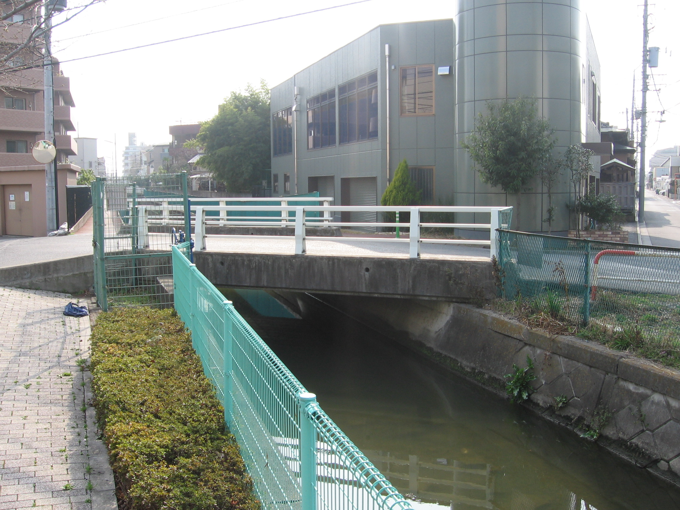 Buzohigashibashi in Saitama-Ken,Japan